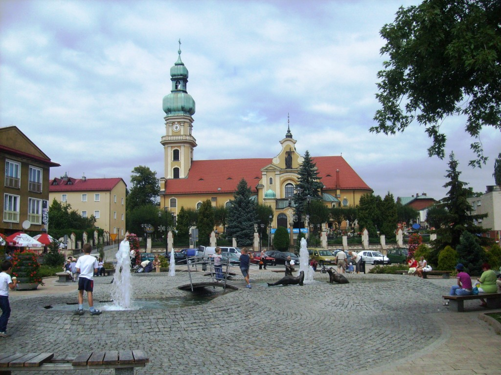 Rynek w Tychach na osiedlu A